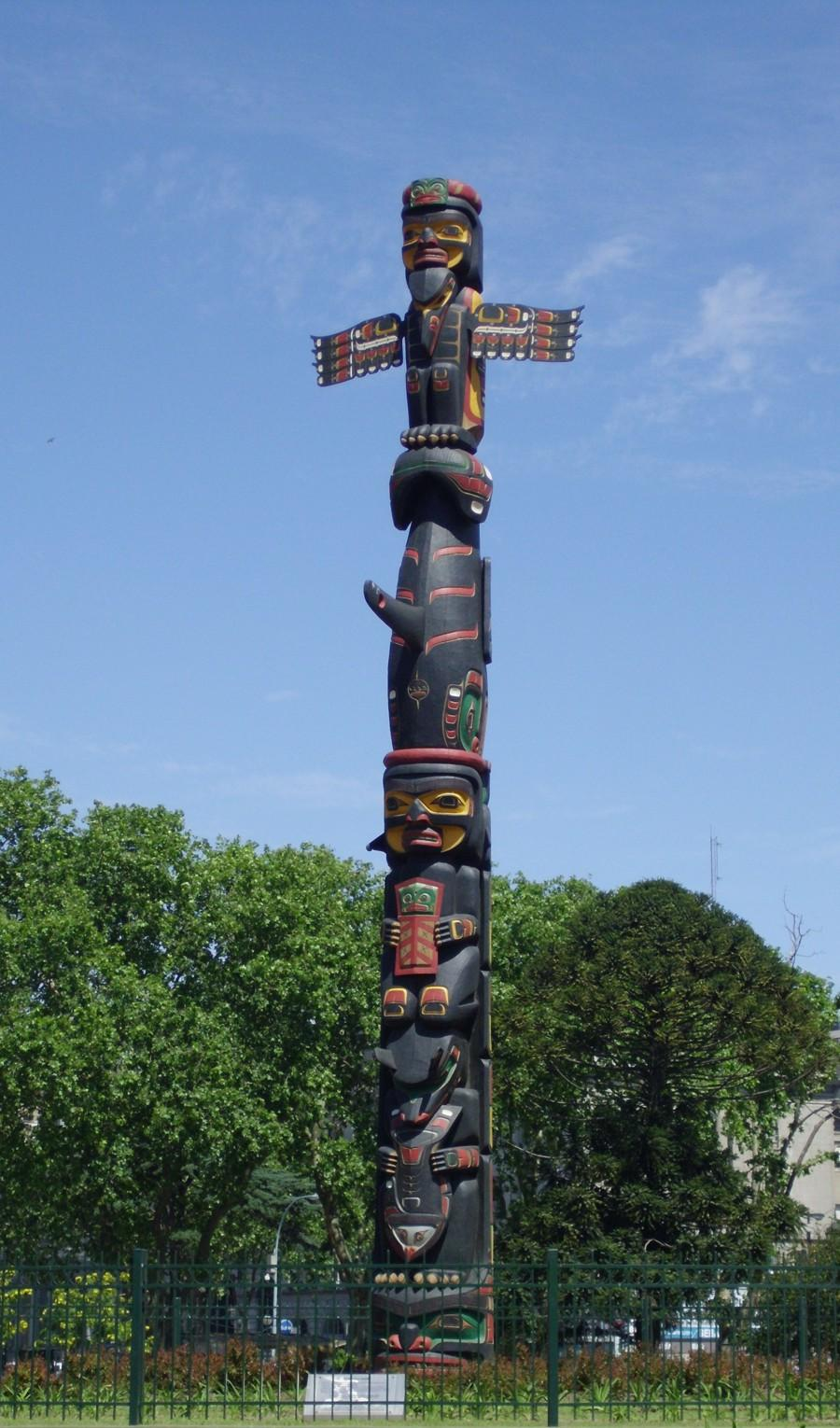 Totem de la Plaza Canadá. Tomada el Domingo 21 de octubre de 2012